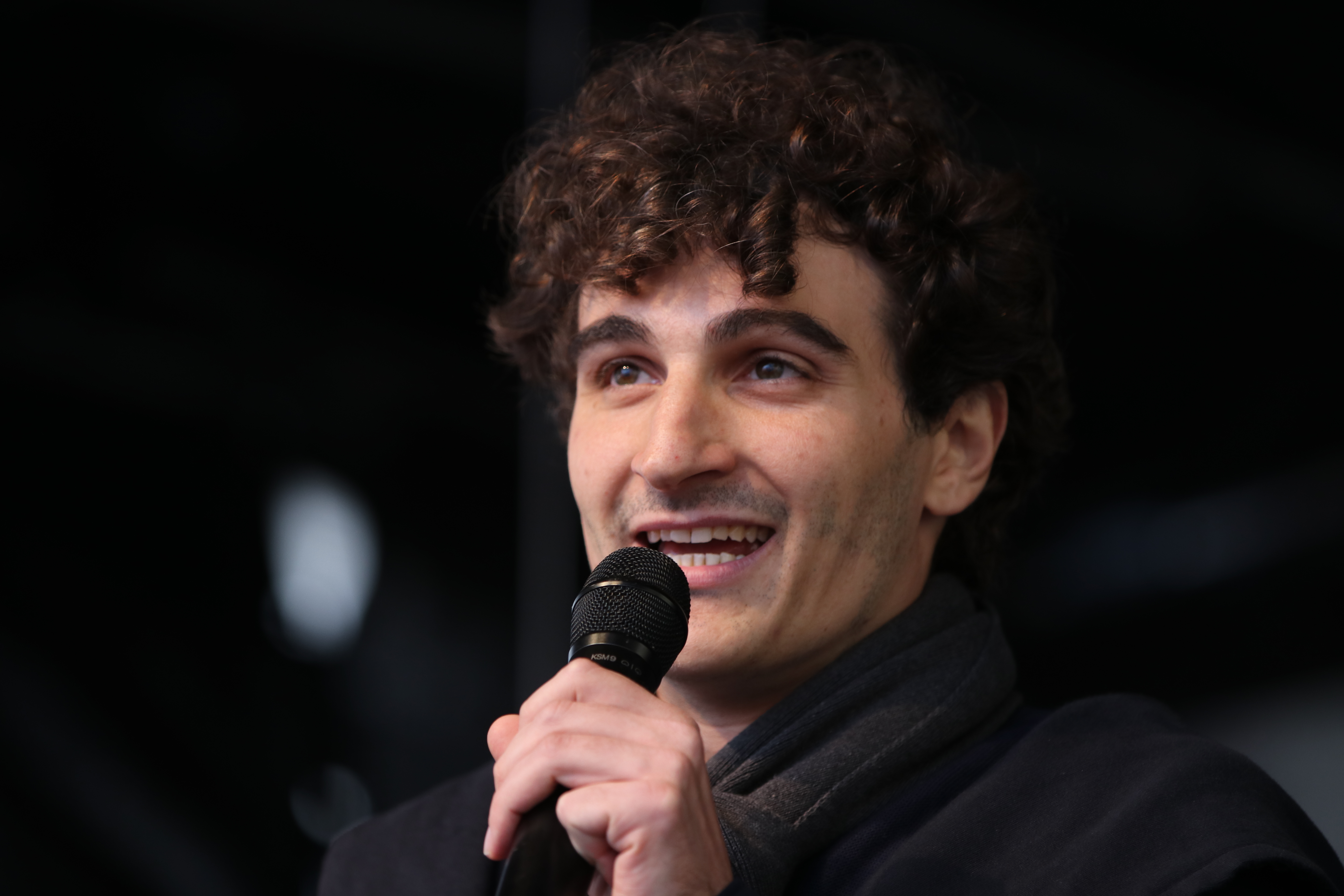 Ates Gürpinar, Die Linke Bayern, am 2018-10-03 auf dem Münchner Odeonsplatz